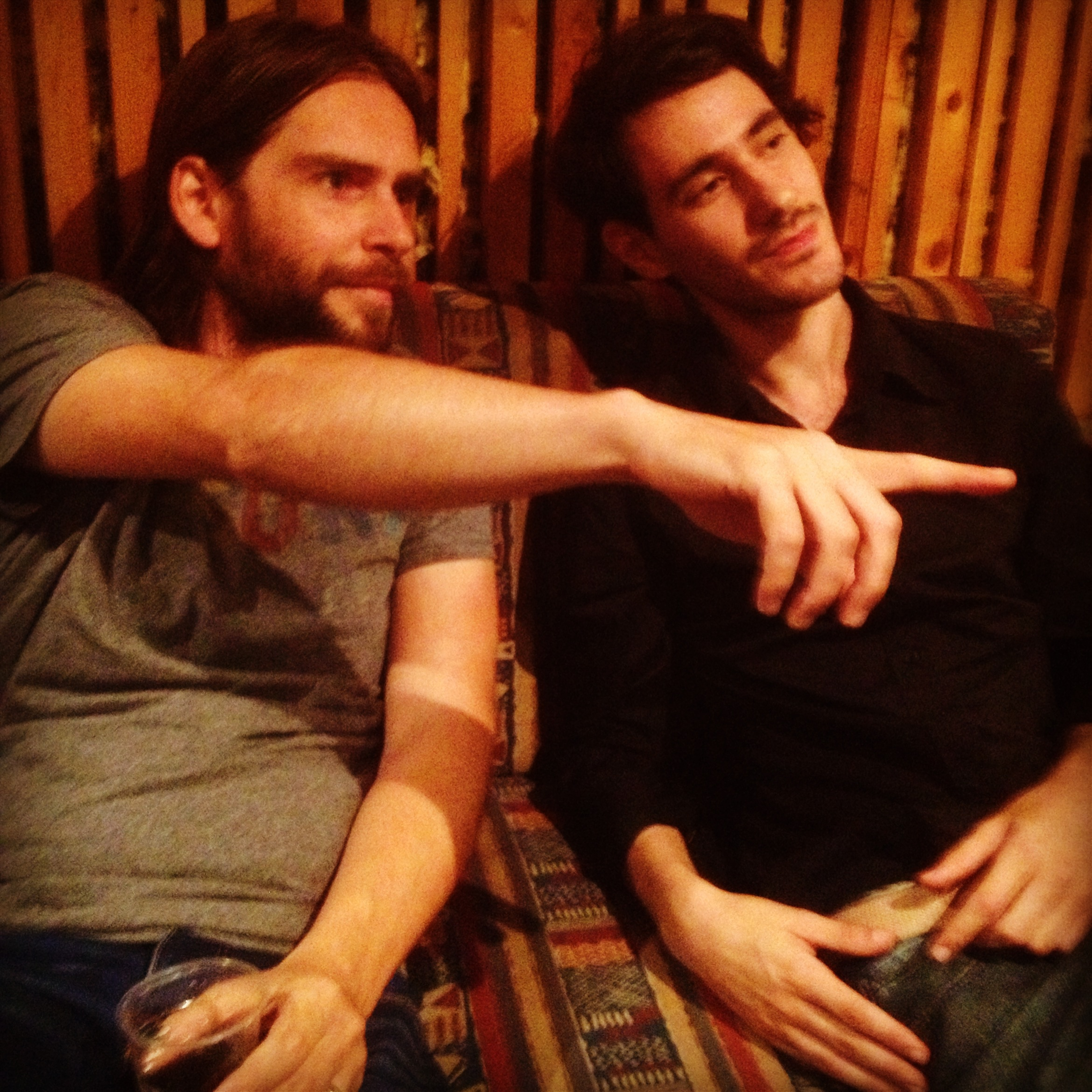 נועם פנחסוב בדרך לאלבום רביעי בהפקתו המוזיקלית של פיטר רוט צילום - שחר שביט